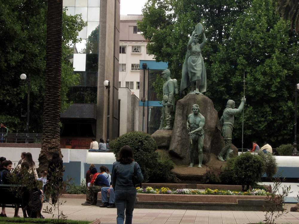 Monumento a la Araucanía, Temuco, Chile